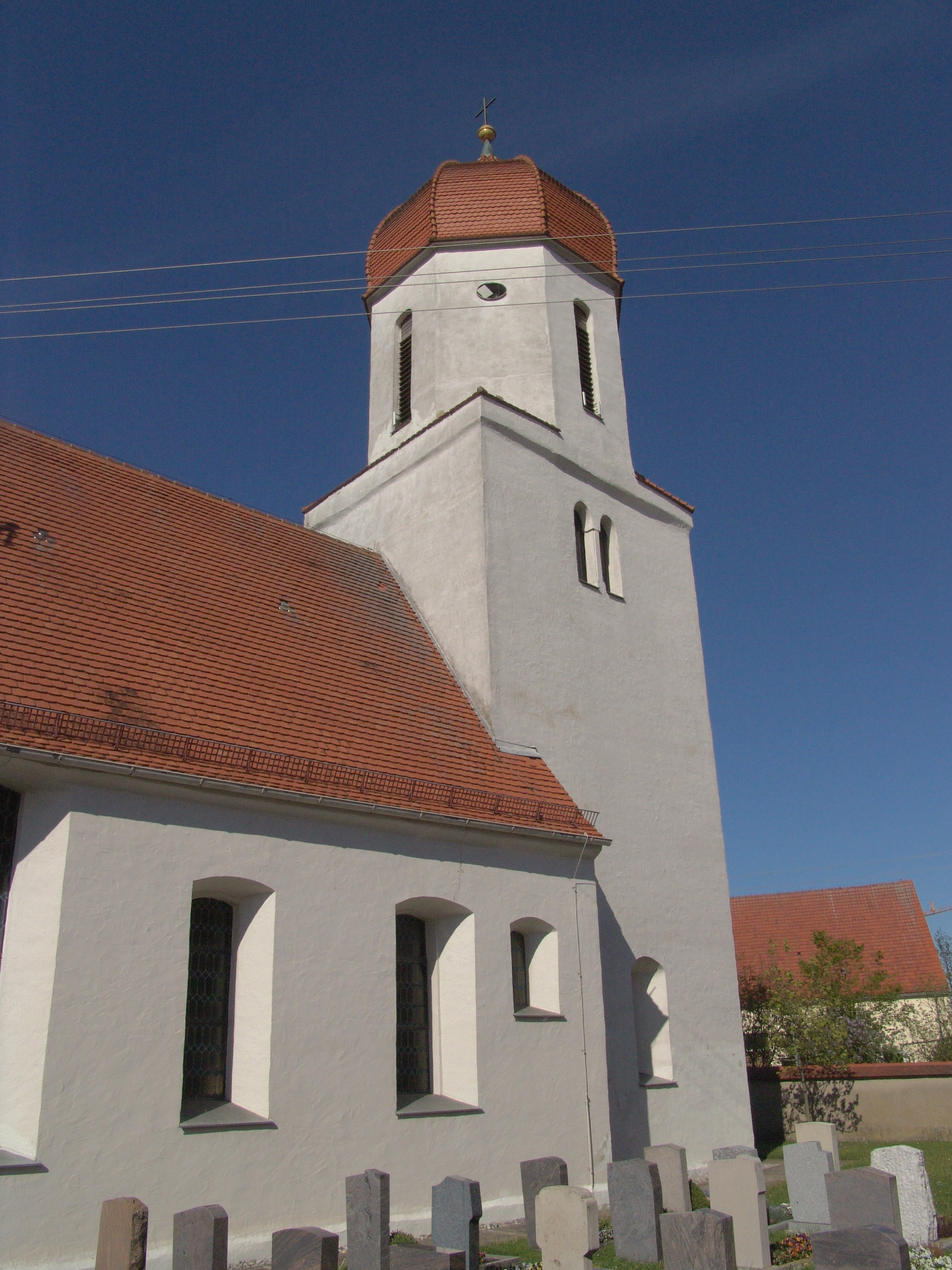 evang.-luth. Kirche St. Gallus in Dürrenzimmern